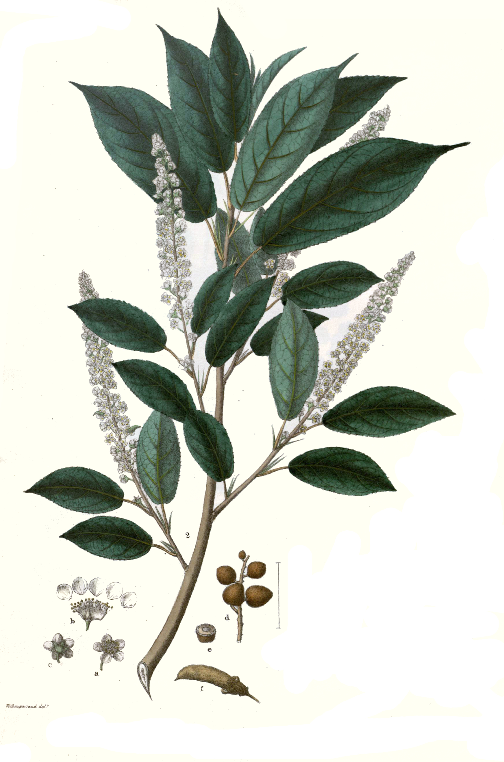 Prinsepia utilis